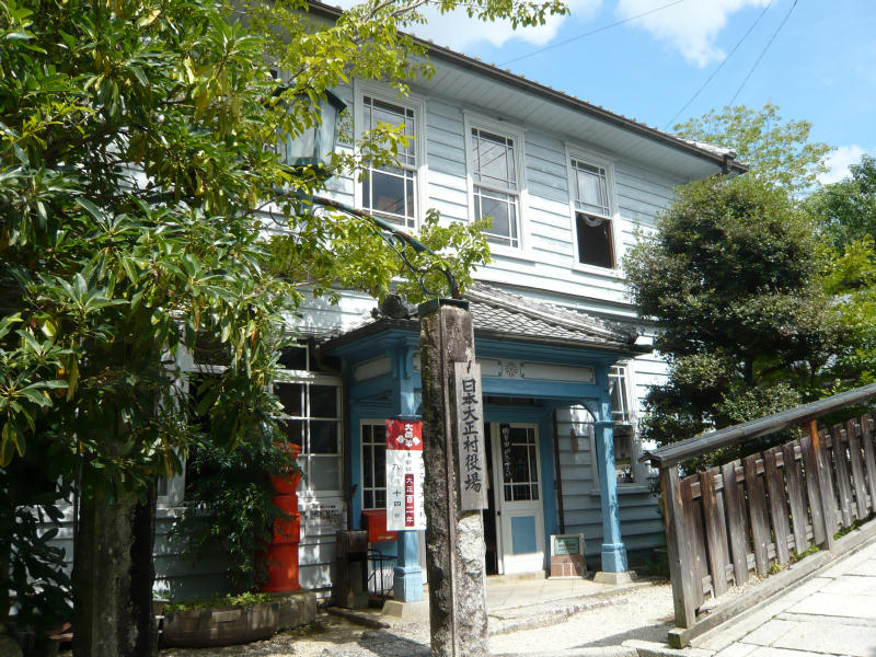 日本大正村役場